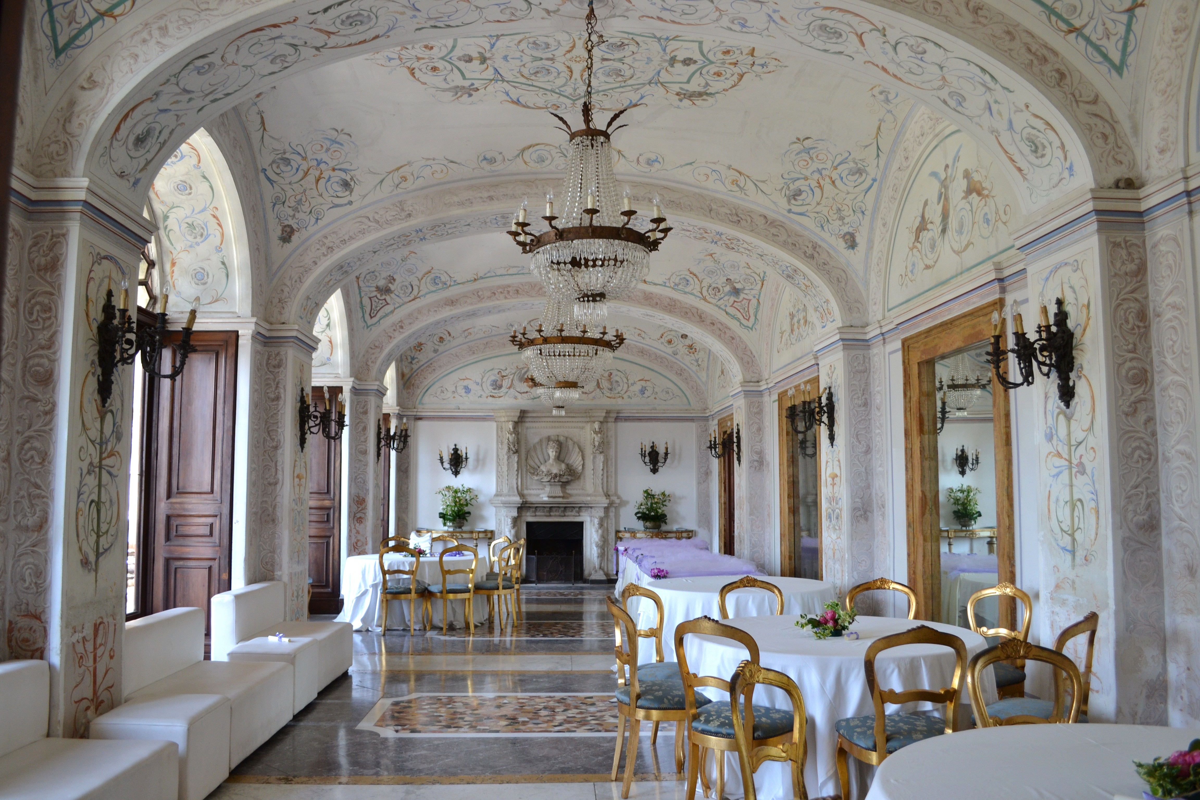 Palazzi di Napoli. Villa La Fiorita. Salita Scudillo.